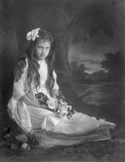 Assunta, Erzherzogin von Österreich-Toskana (1902 - 1993)